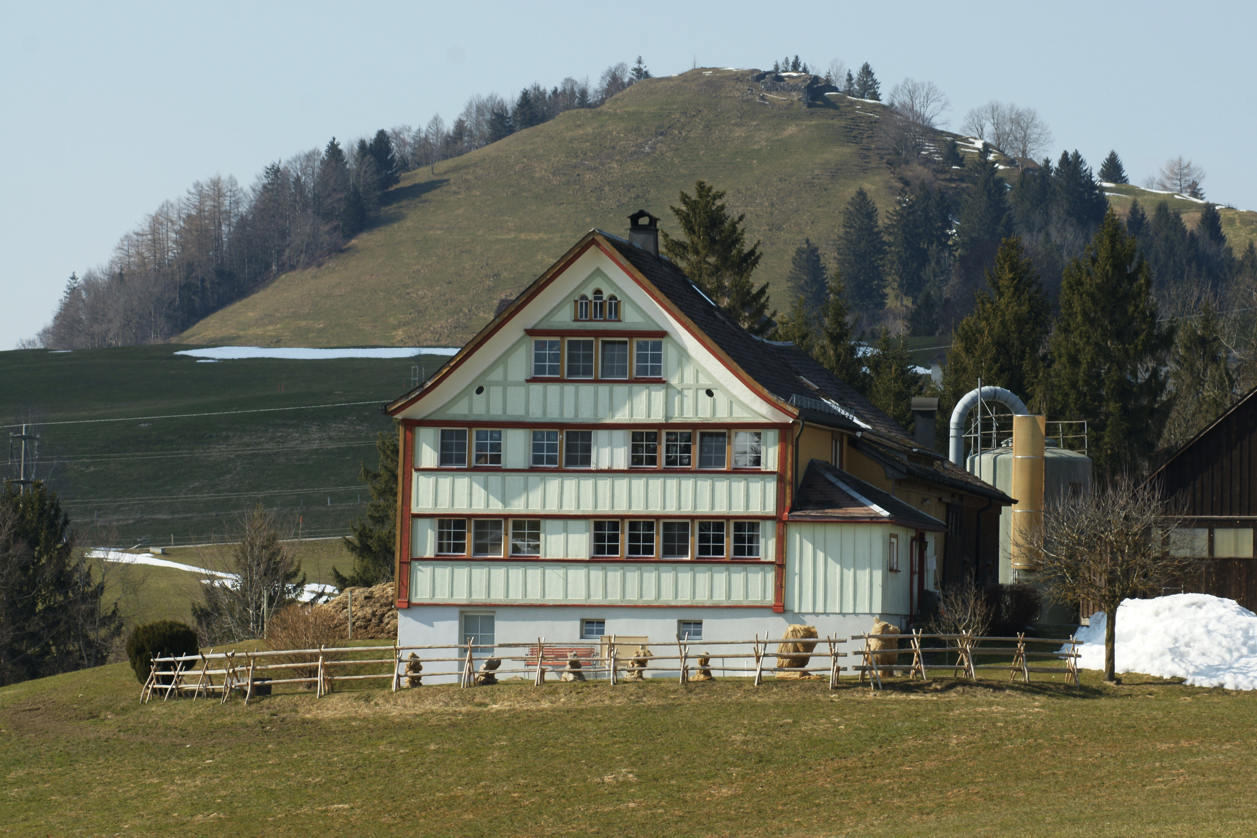 Appenzeller Bauernhaus gelegen an der Gaiserstrasse zwischen Gais und Appenzell.